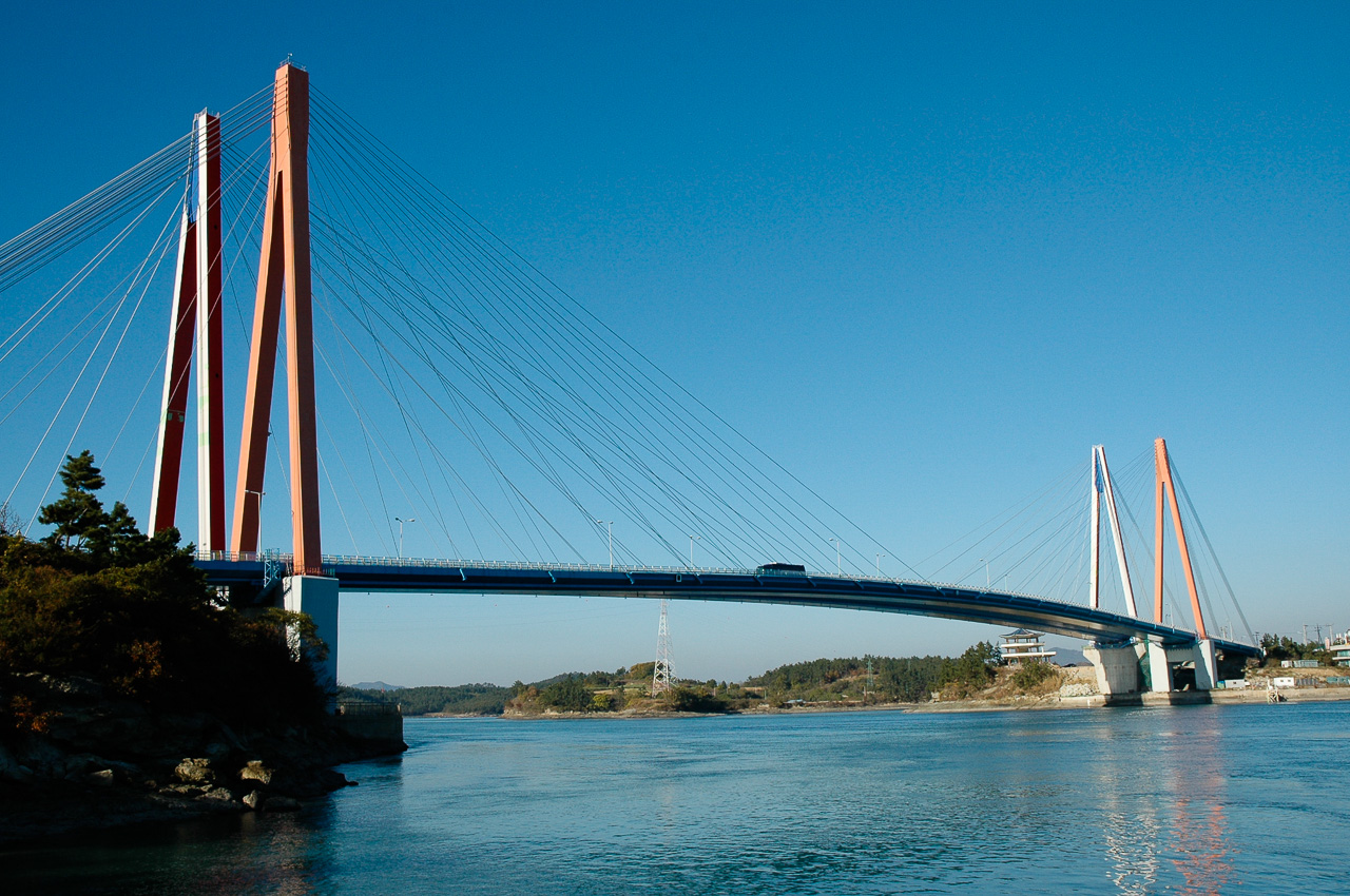 진도대교 Jindo Bridge